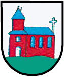 Herb Wieszowy (gmina Zbrosławice, powiat tarnogórski, województwo śląskie, Polska)